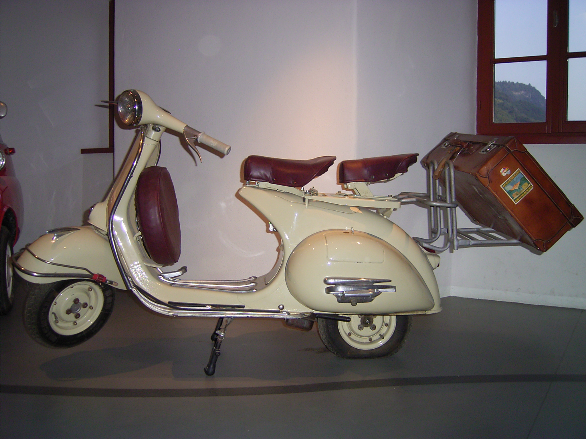 Zweisitzer Vespa